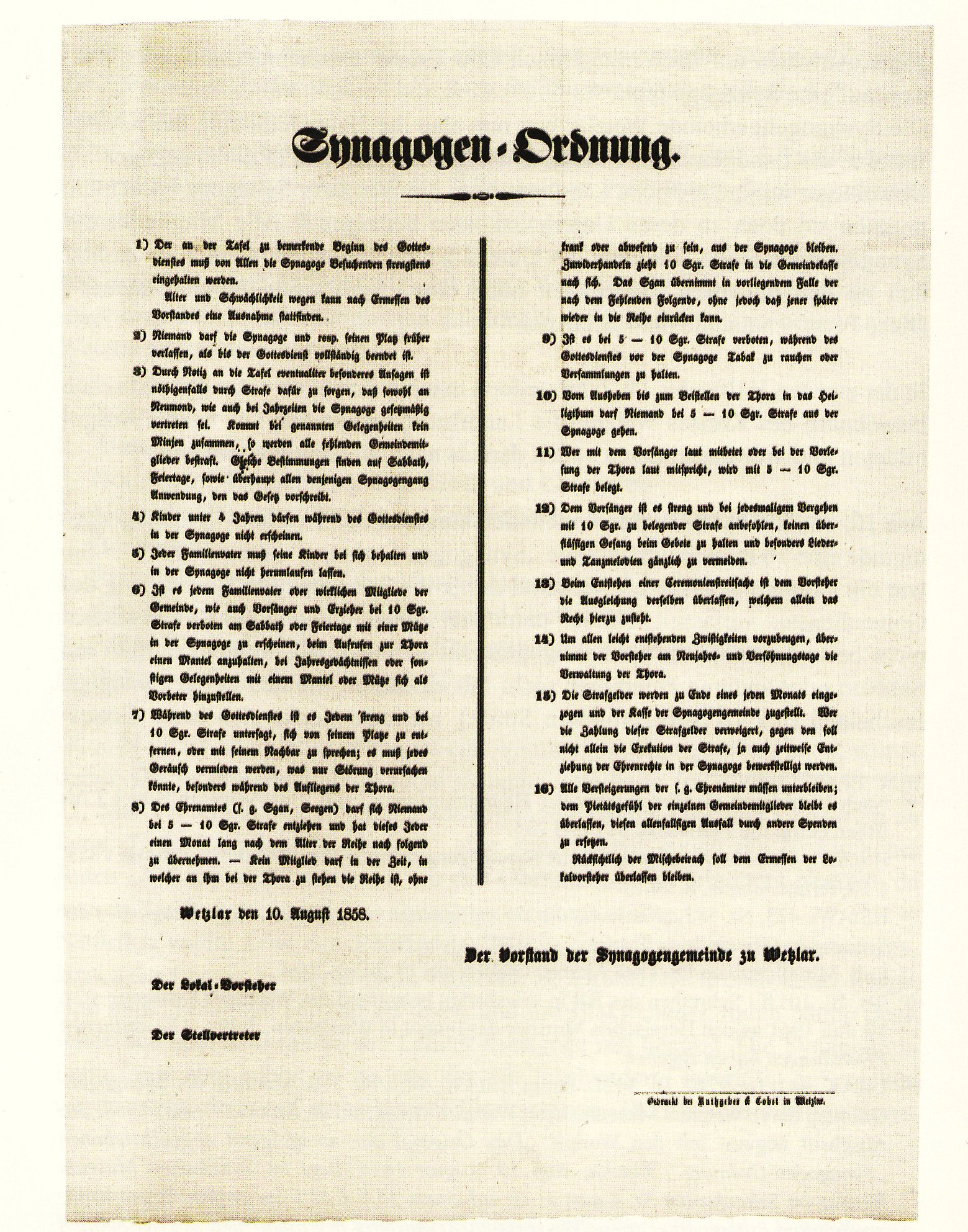 Die Synagogenordnung der Jüdischen Gemeinde zu Wetzlar von 1858